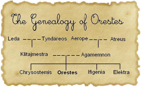 Orestes